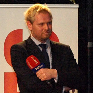 Jaroslav Plesl, šéfredaktor MF DNES, jako moderátor předvolební debaty s lídry osmi kandidátek; pořádala MAFRA, a. s. (deníky MF DNES a Metro, portál iDNES.cz, týdeník 5plus2) ve Velkém sále Městské knihovny v Praze na Mariánském náměstí.